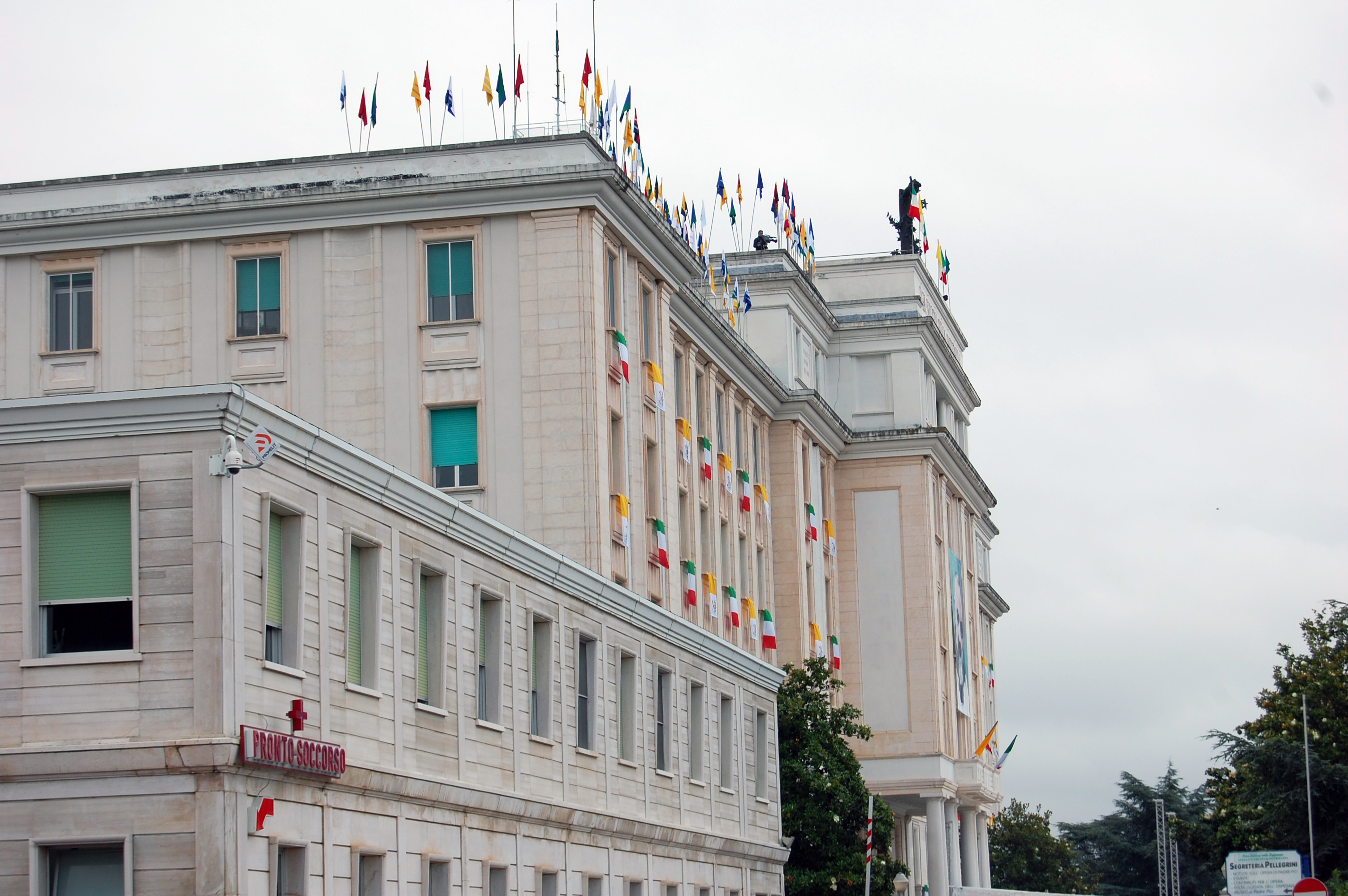 Ospedale Casa Sollievo della Sofferenza, San Giovanni Rotondo